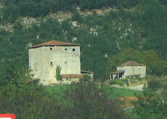 Casa torre de Barroeta en Markina, Vizcaya, País Vasco, España.